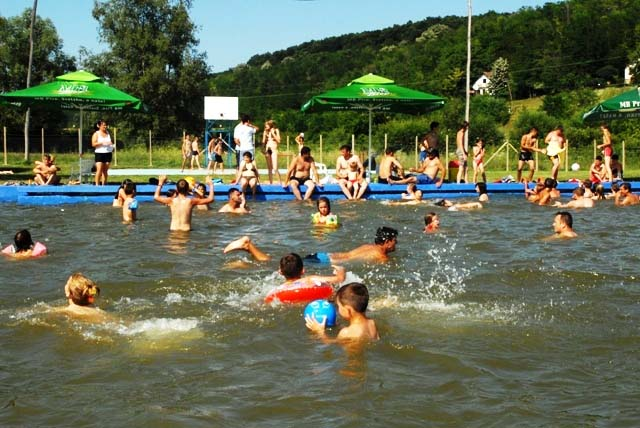 bazen pored podruma